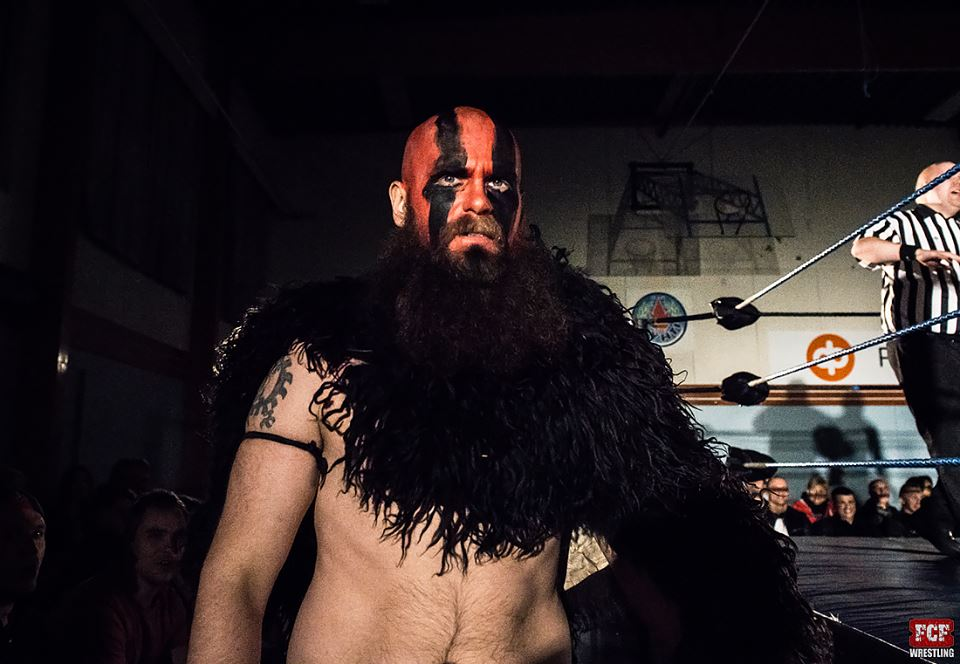 FCF Pro Wrestler Heimo Ukonselkä